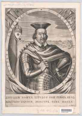 Alvise Mocenigo (1583-1654)